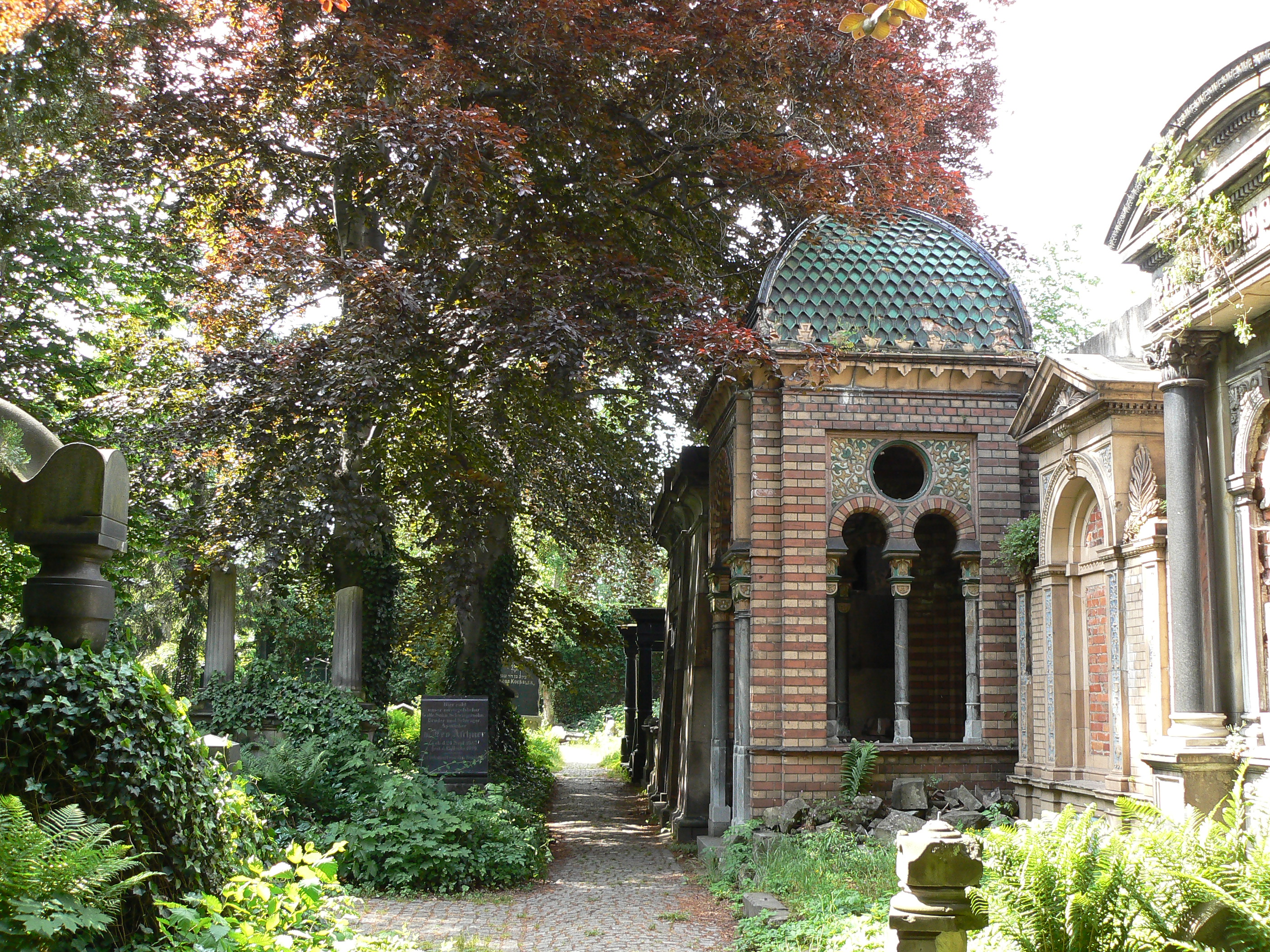 Grobowiec rodziny Kaufmannów na Starym Cmentarzu Żydowskim we Wrocławiu